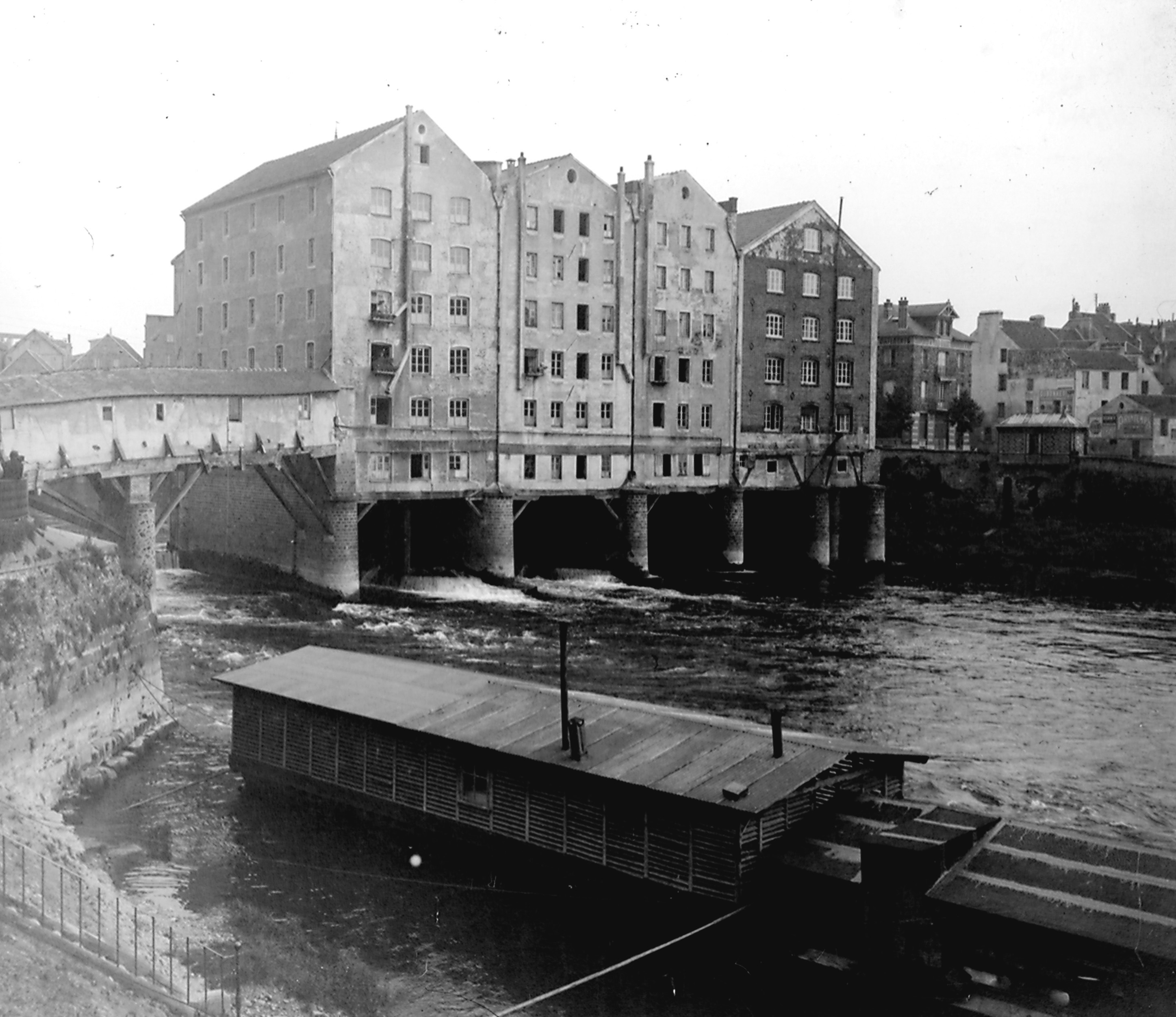 Meaux - Moulin sur la Marne à Meaux. Photo prise par mon grand-père Maurice Terrien le 10 Septembre 1916.